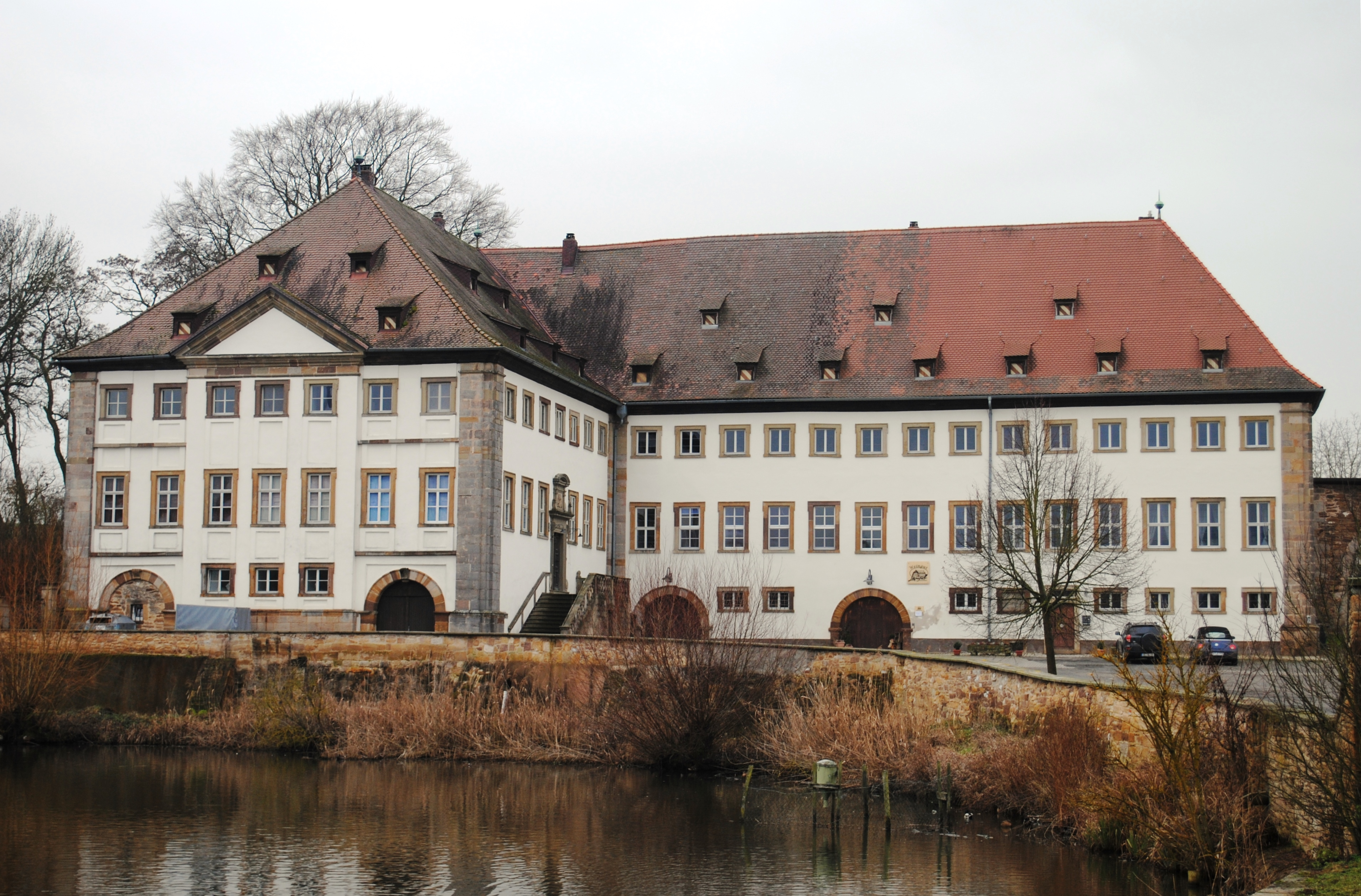 Schloss Bimbach, Prichsenstadt-Bimbach